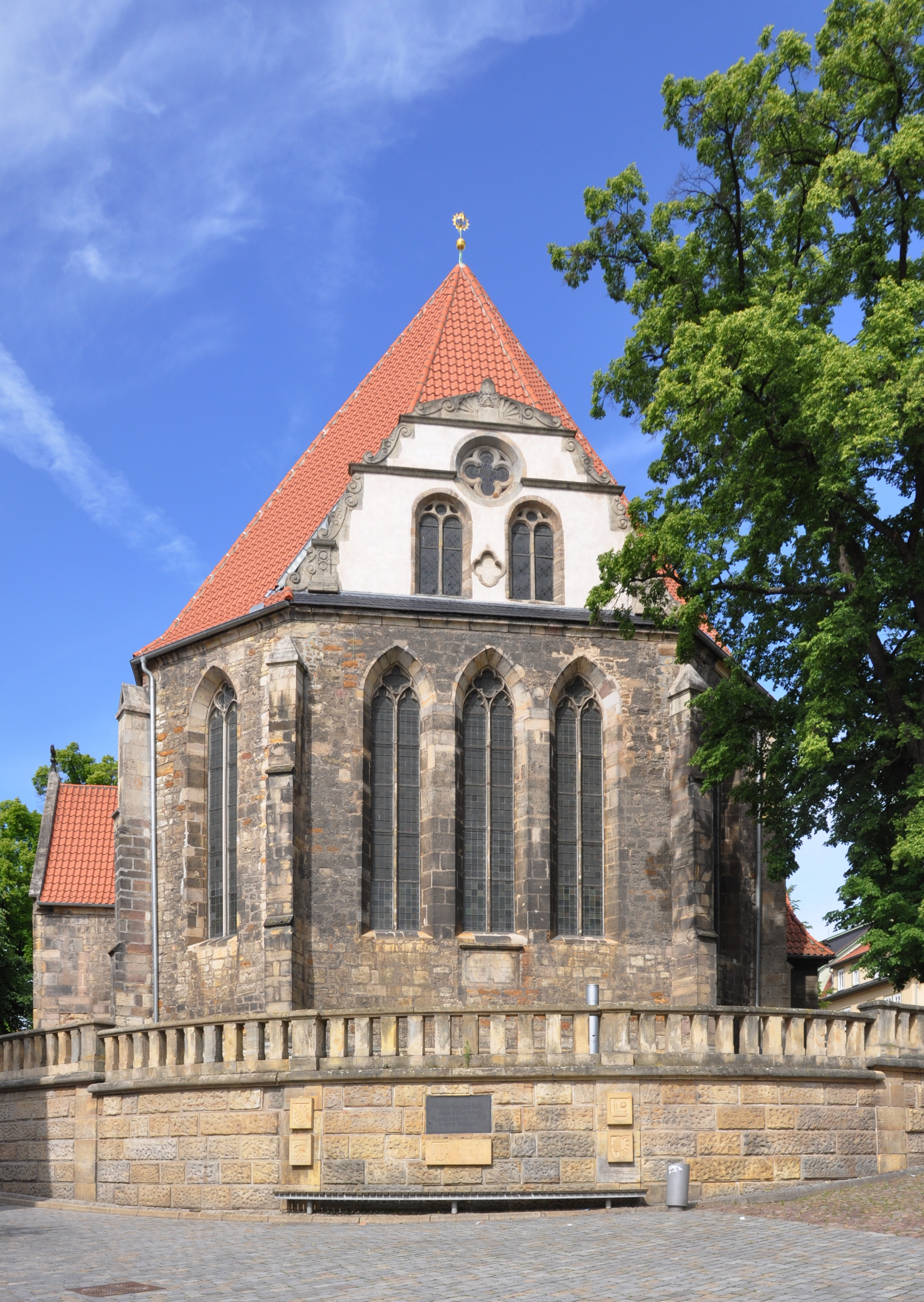 Arnstadt (Thüringen), Bachkirche